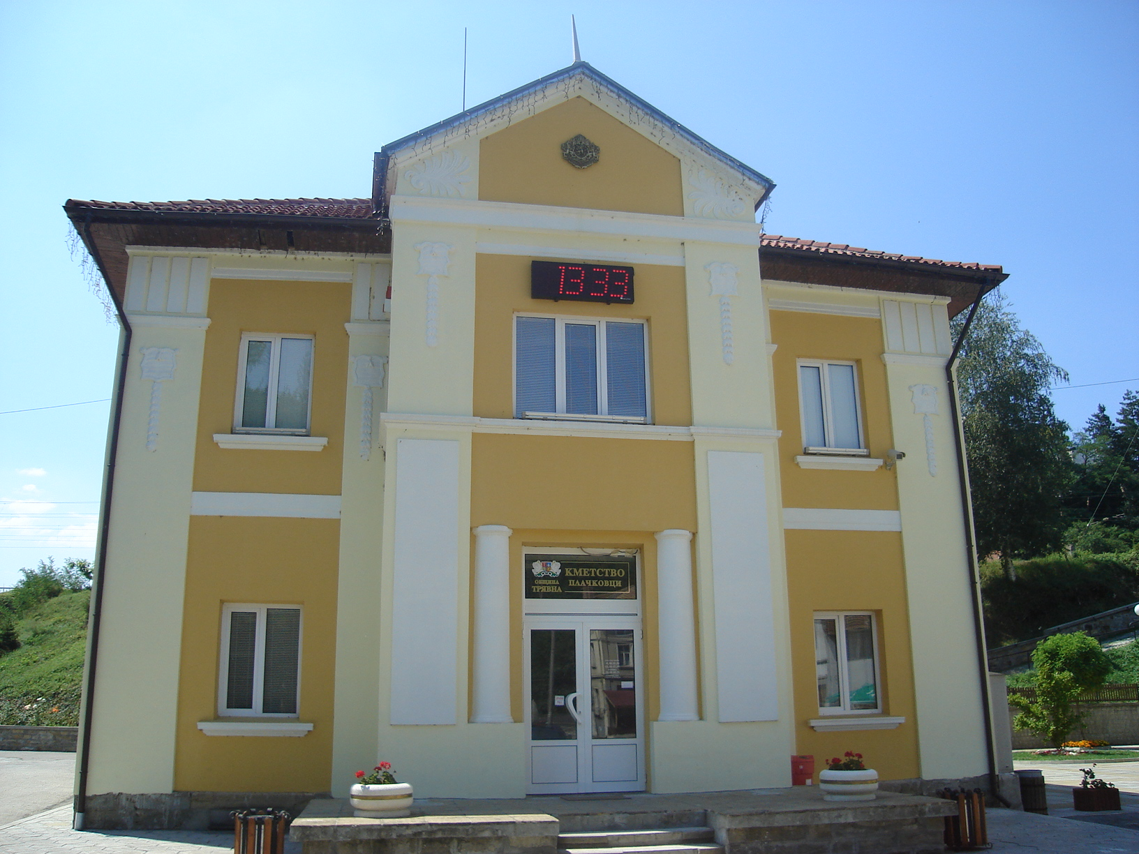 Кметството в Плачковци